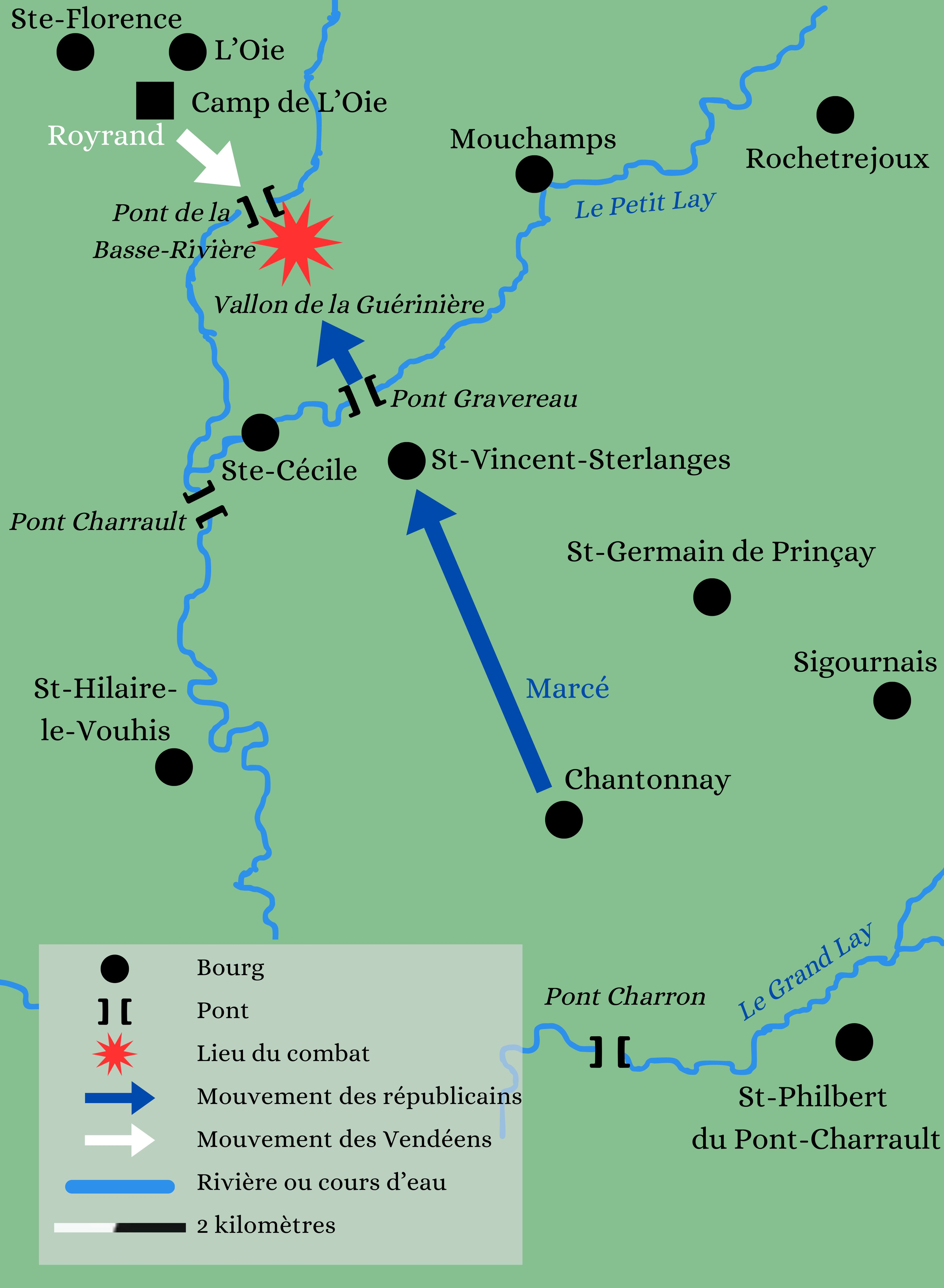 Carte de la bataille de Pont-Charrault, le 19 mars 1793, pendant la guerre de Vendée